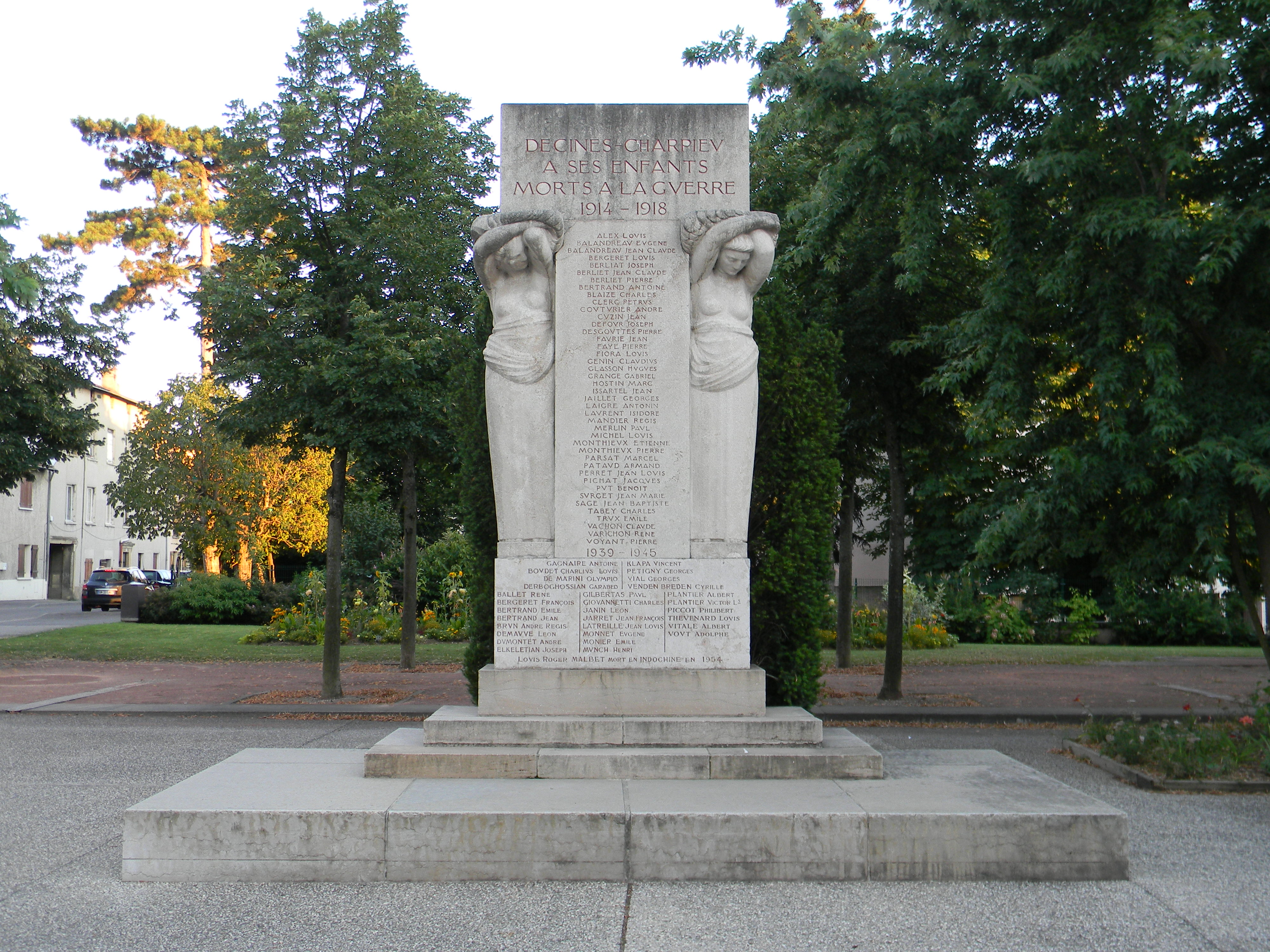 Décines-Charpieu à ses enfants morts à la guerre 1914-1918, 1939-1945 et 1954.